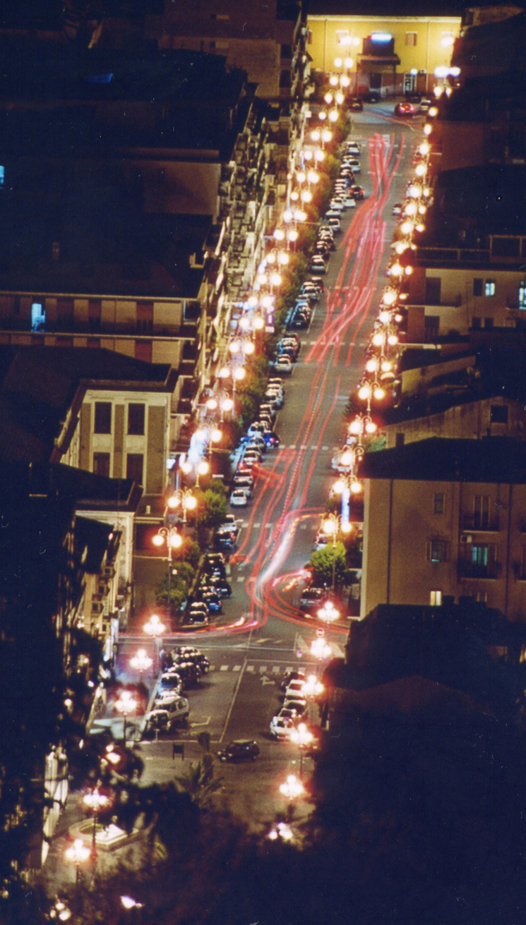 Lamezia Terme: Notturno di Corso Giovanni Nicotera. Autore: Francesco Cataudo